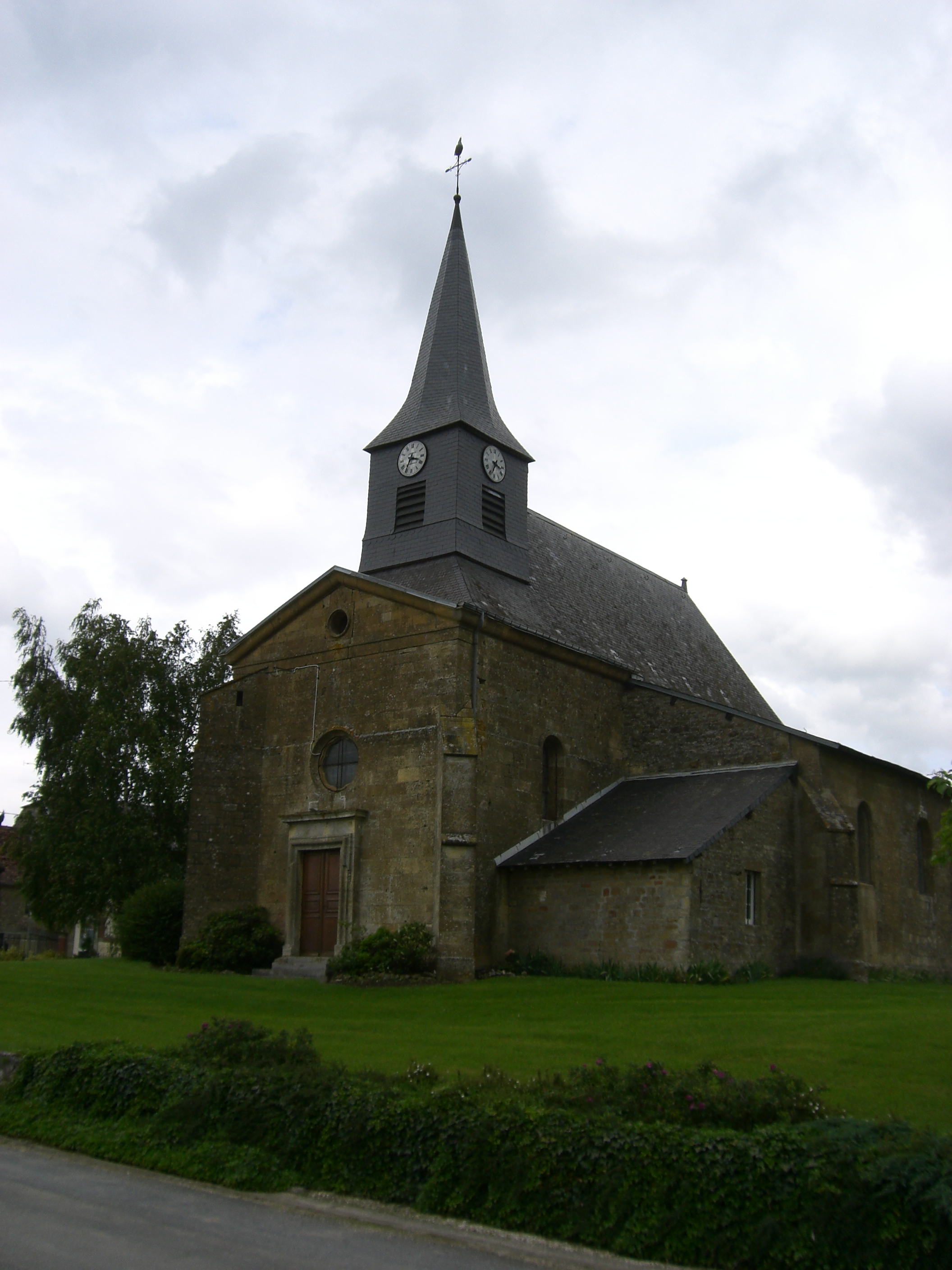 Eglise de Thénorgues (Ardennes, France)